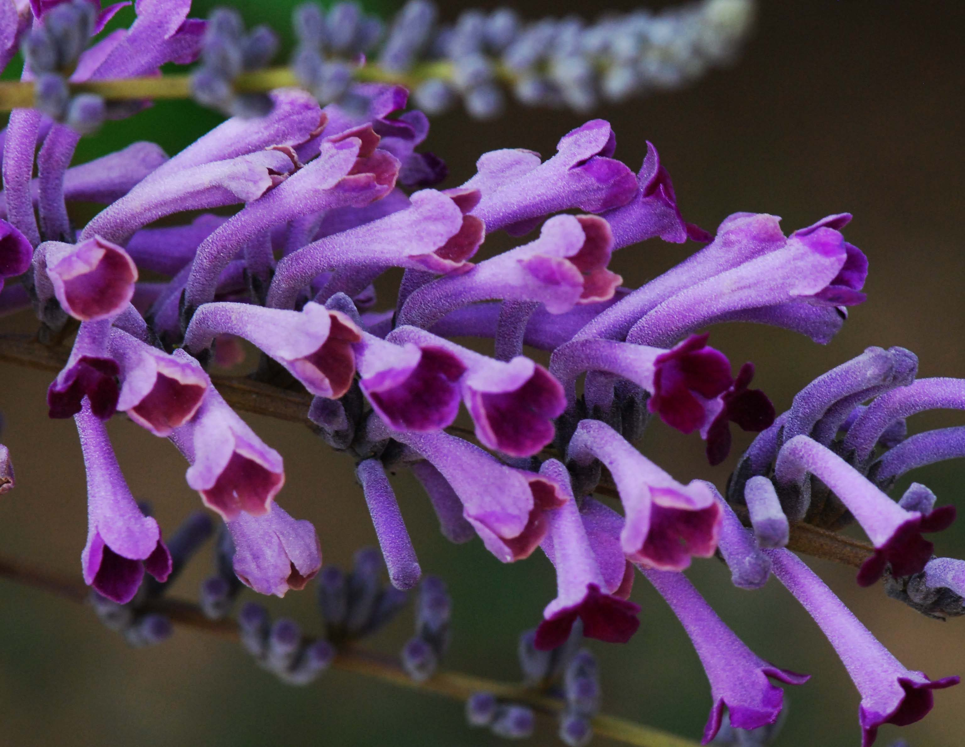 Buddleja lindleyana, fleurs, Jardin des Plantes de Paris